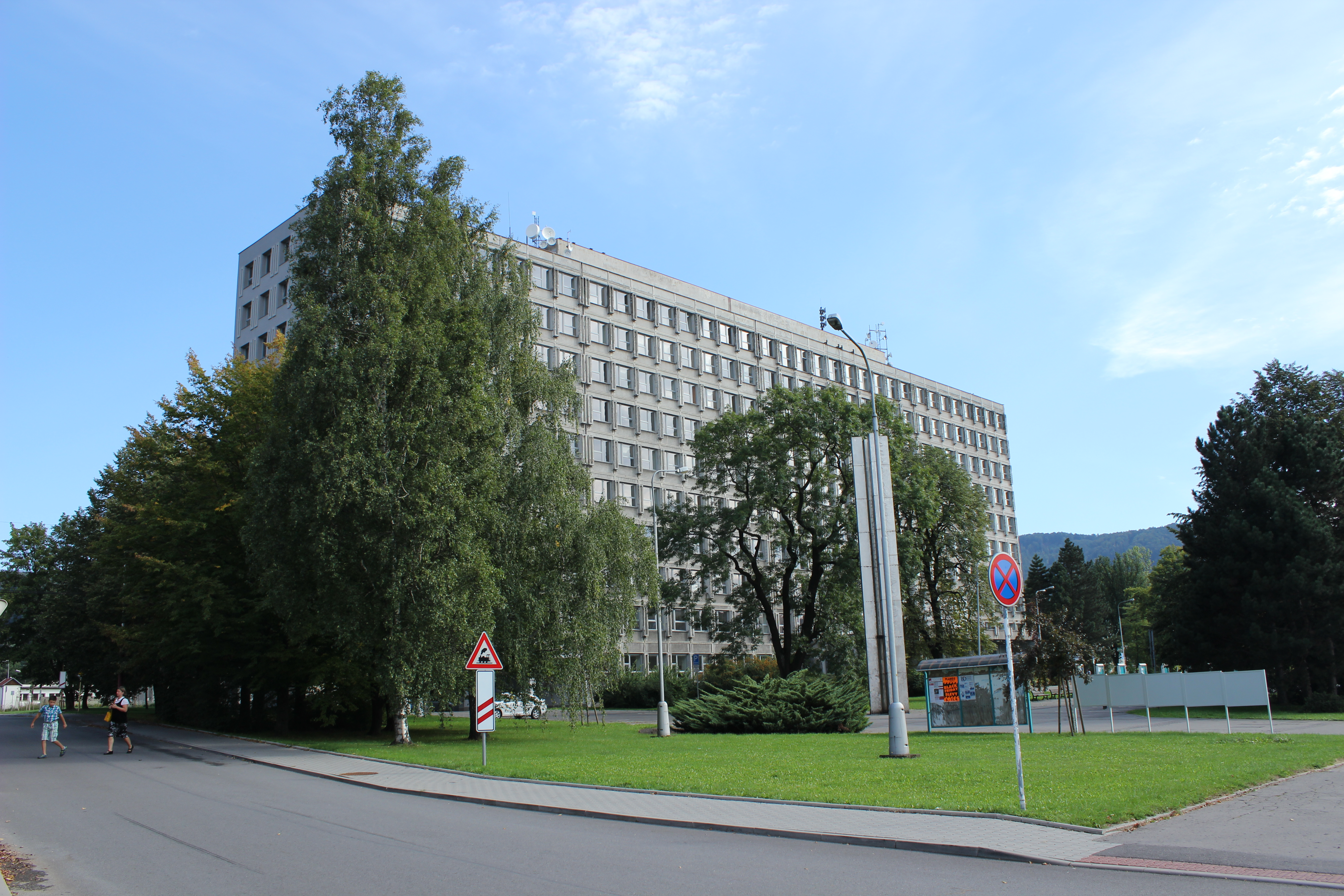 Budova kopřivnického městského úřadu. This image was acquired during the event Wikiměsto Kopřivnice.